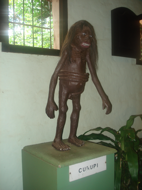 Kurupi. Mitología Guarani